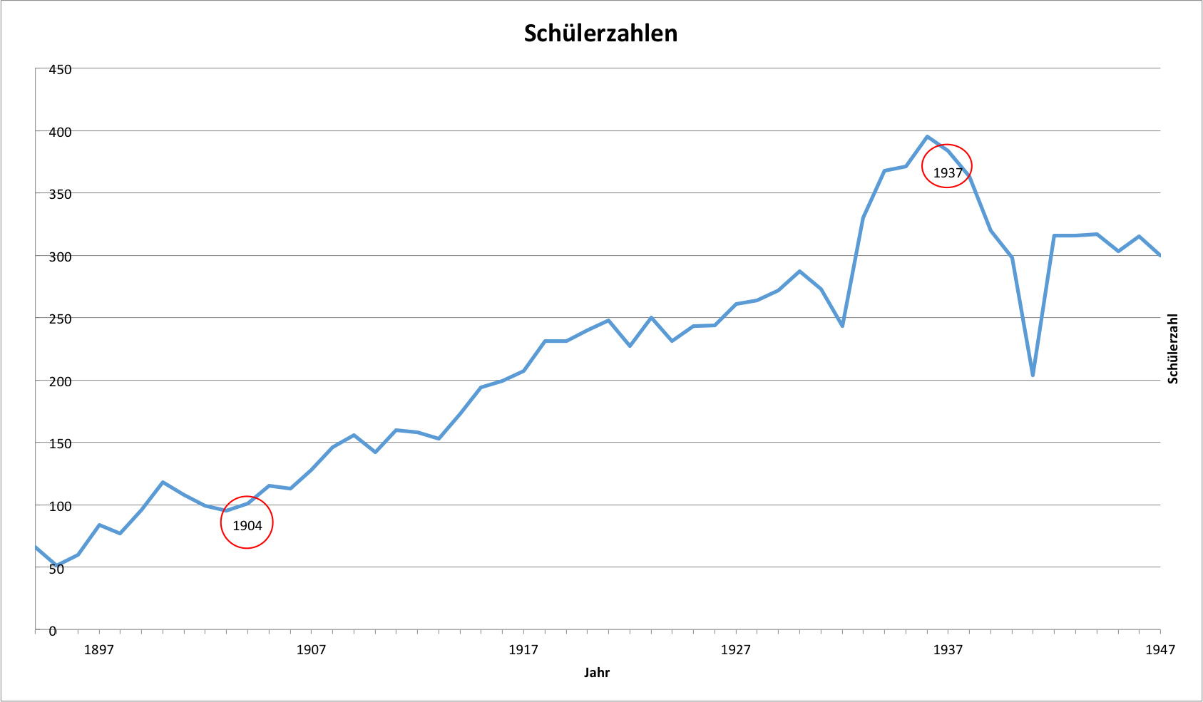 Schülerzahlen an der Kantonsschule Trogen zwischen 1894 und 1947